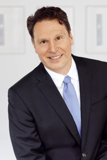 Principal Partner Enzweiler und Partner Partnerschaftsgesellschaft